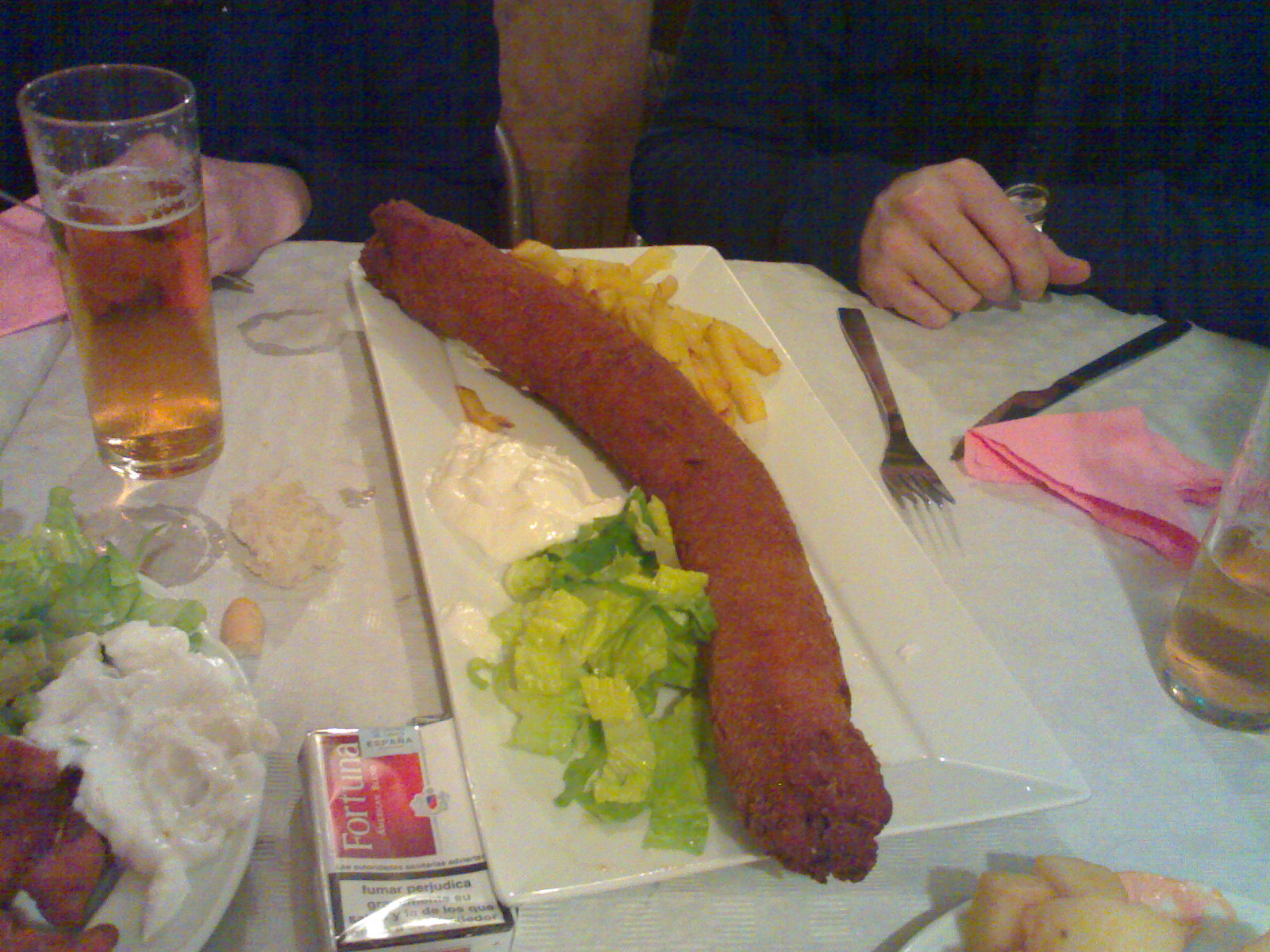 Los flamenquines más grandes y más sabrosos que puedan probar nunca.